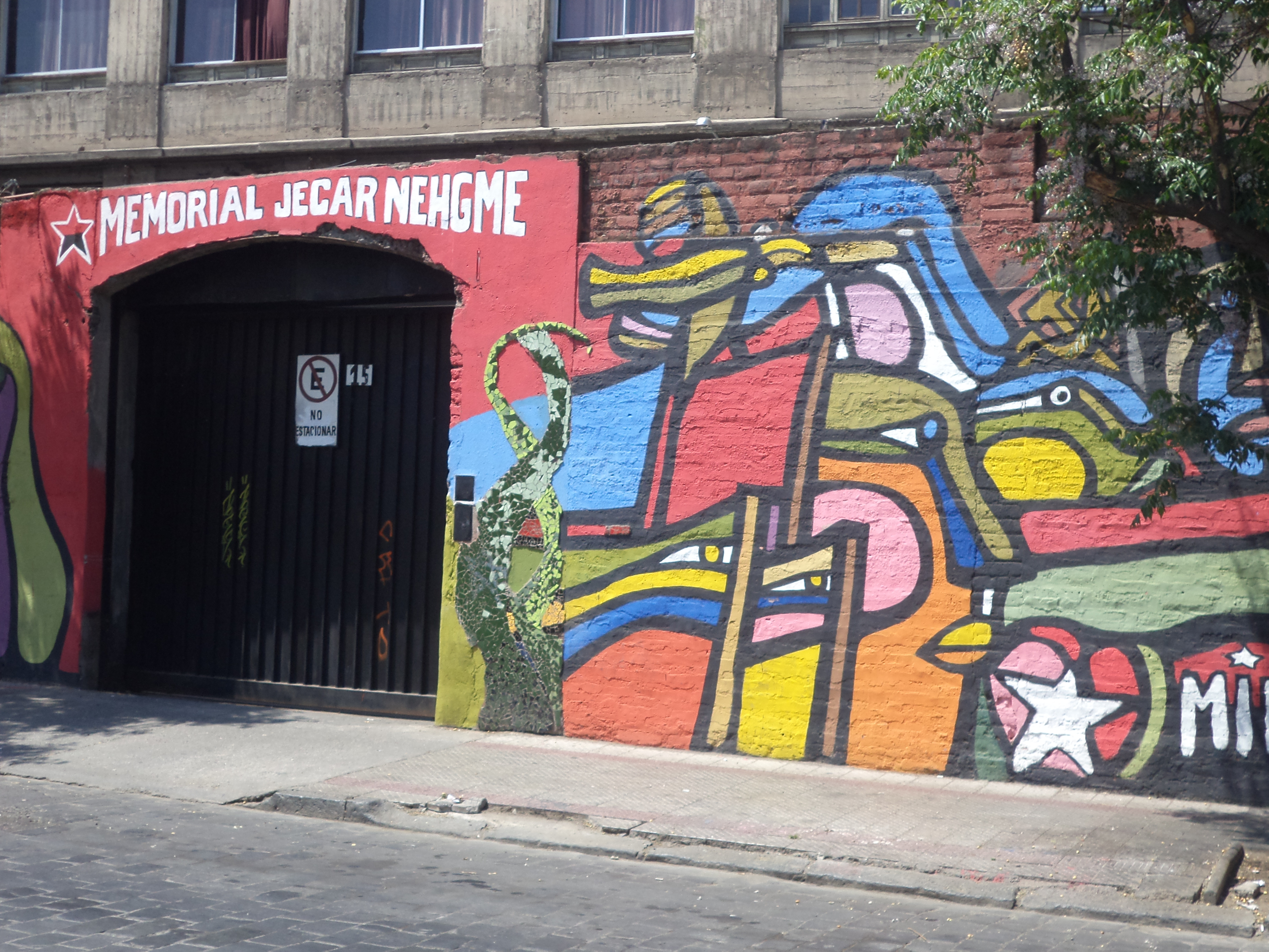 Pinturas murales en honor al militante del MIR Jécar Neghme y el Sacerdote español Joan Alsina en el lugar donde fue asesinado durante gobierno de Augusto Pinochet en Santiago de Chile.